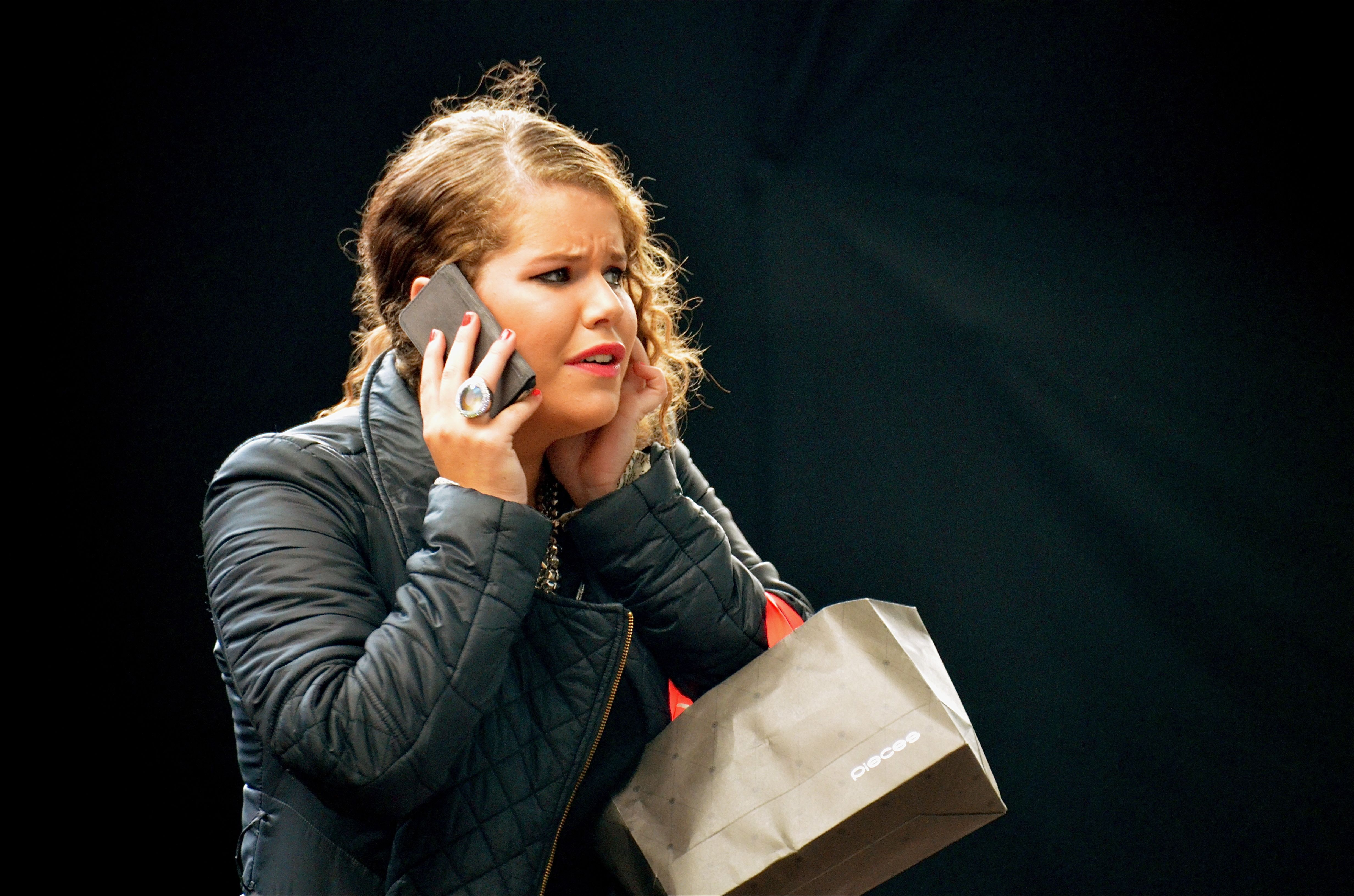 tijdens de officiele opening van het nieuwe Fries Museum in Leeuwarden op 13 september 2013